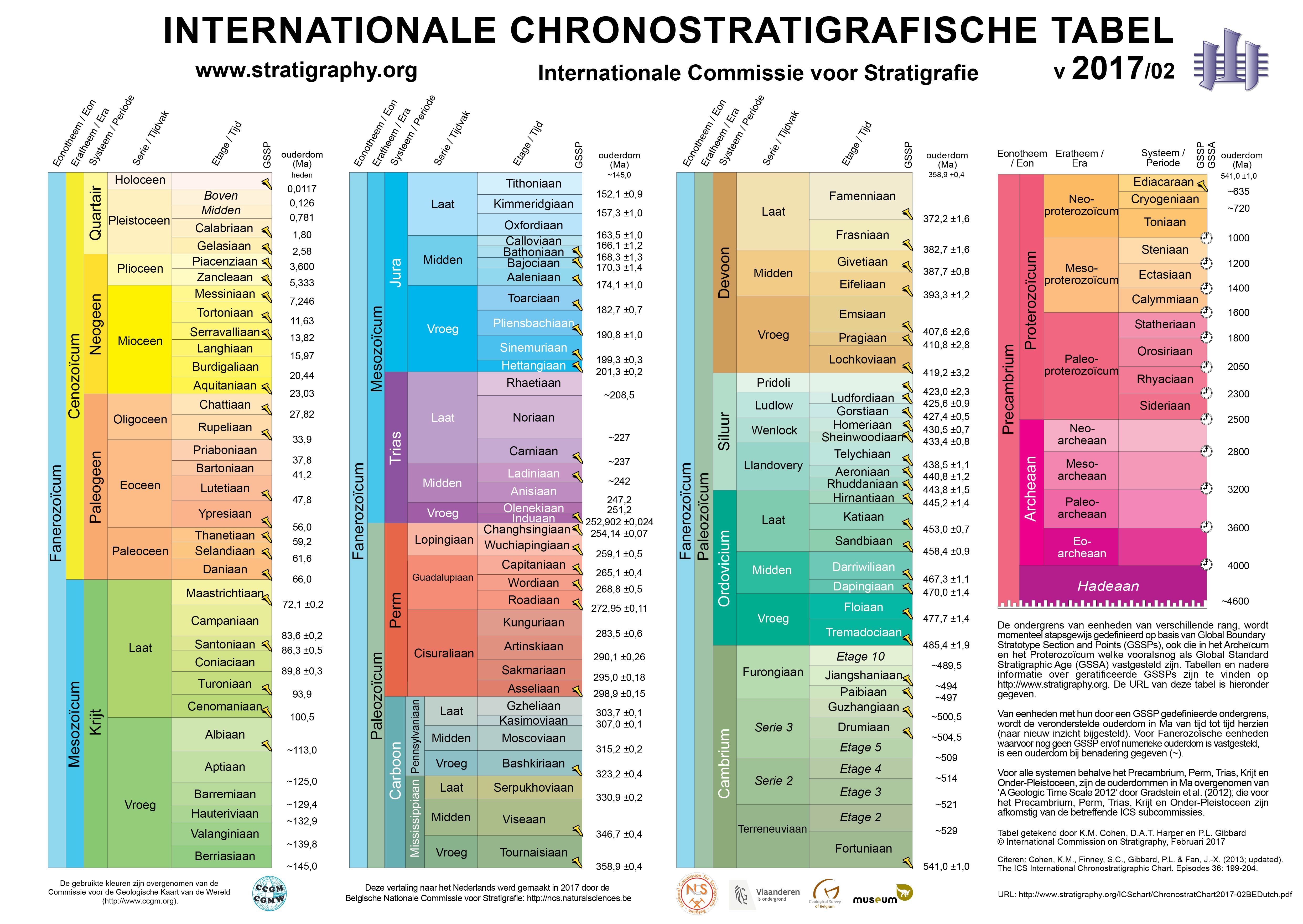 chronostratigrafische kaart 2017NL